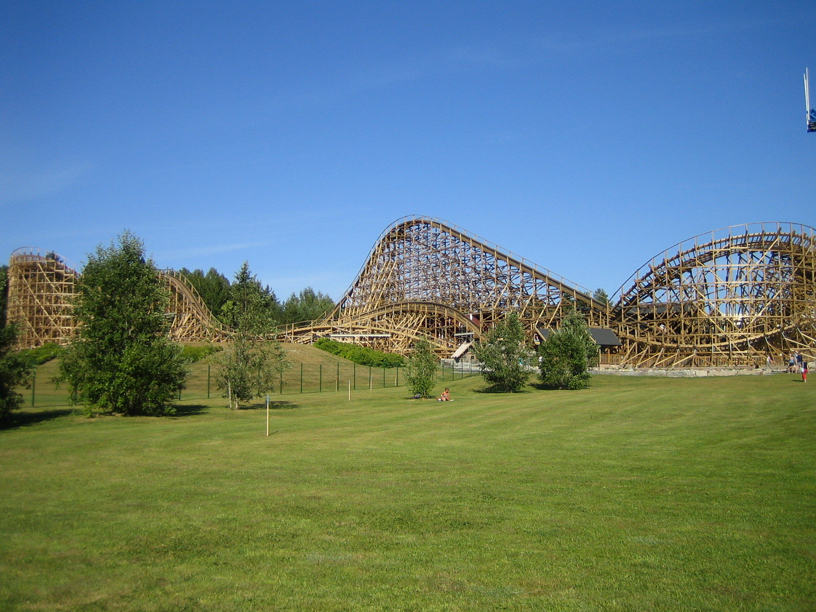 PowerParkin Thunderbird-vuoristoradasta